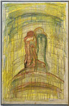 Zweisamkeit - die ganz große Liebe